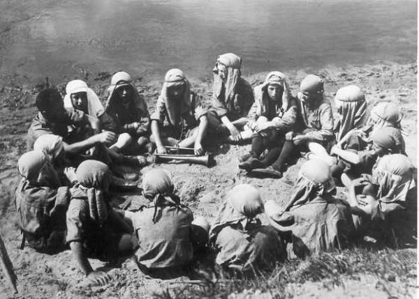 un groupe de jeunes gens explicitement désignés comme membres du mouvement de jeunesse juif "Hashomer Hatzair". Il est donc légitime de les classer dans la catégorie "Jewish Children".